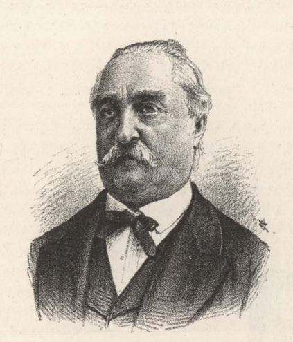 Pákai Kölber Fülöp Jakab (Pest, 1816. október 2. – Budapest, 1902. május 25.) kocsigyáros, Ferenc József-rend lovagja, a „Kölber Testvérek” cég tulajdonosa, vezérigazgatója.